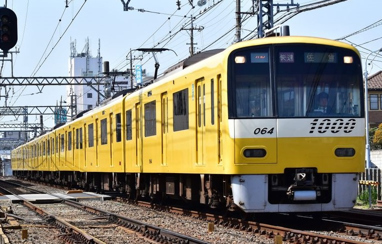 子供たちのハッピーを乗せて登場した京急イエローハッピートレイン。 京成本線八千代台～大和田